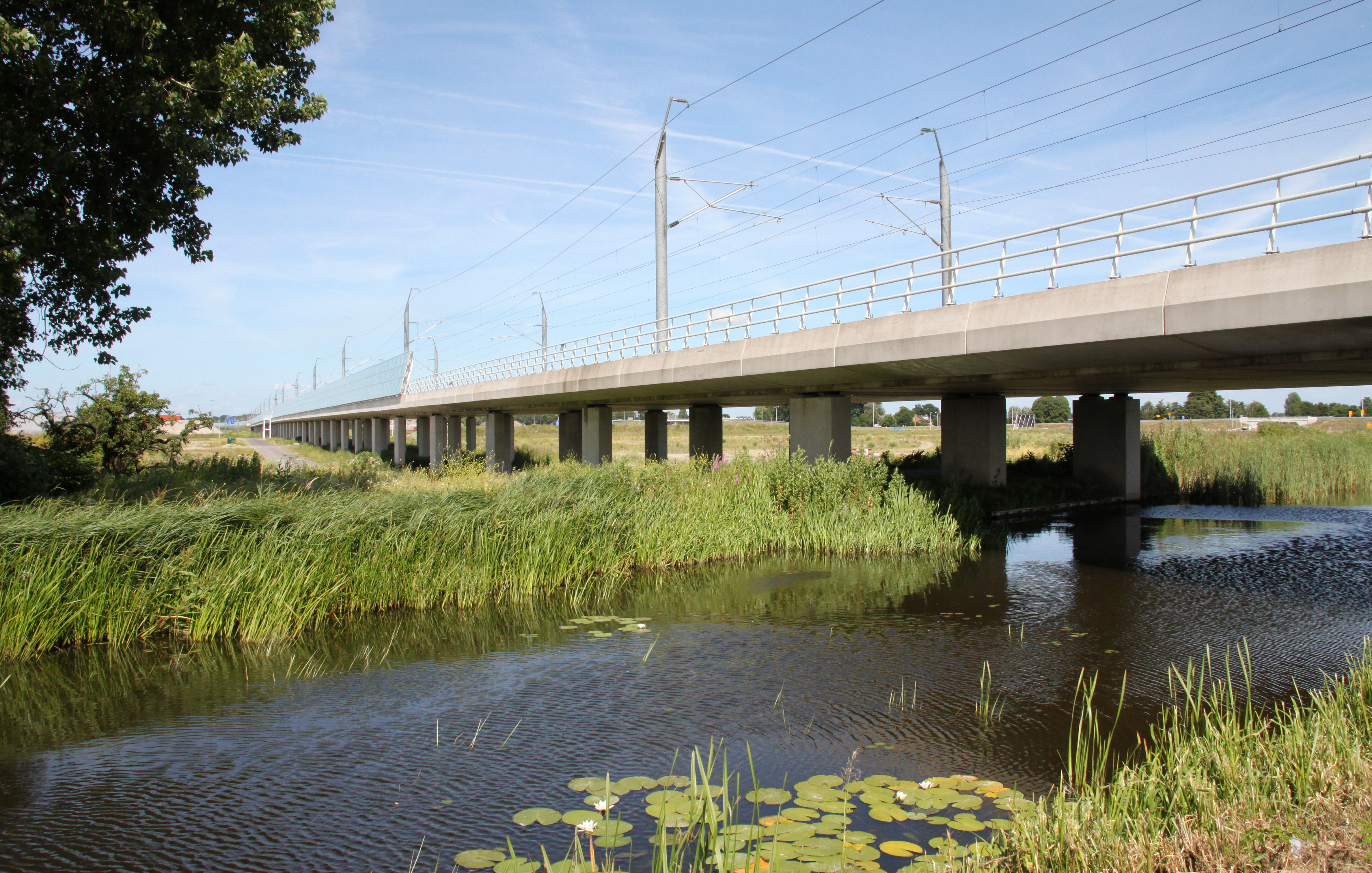 Het tracé van de HSL-Zuid bij Zoetermeer.